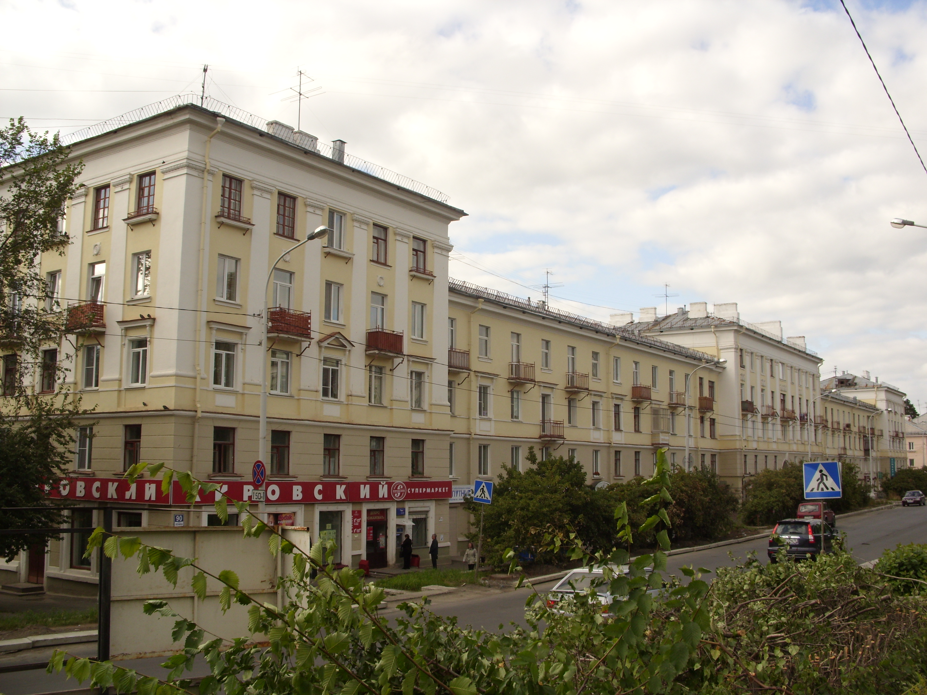 Улица Ленина, д. 90. Новоуральск